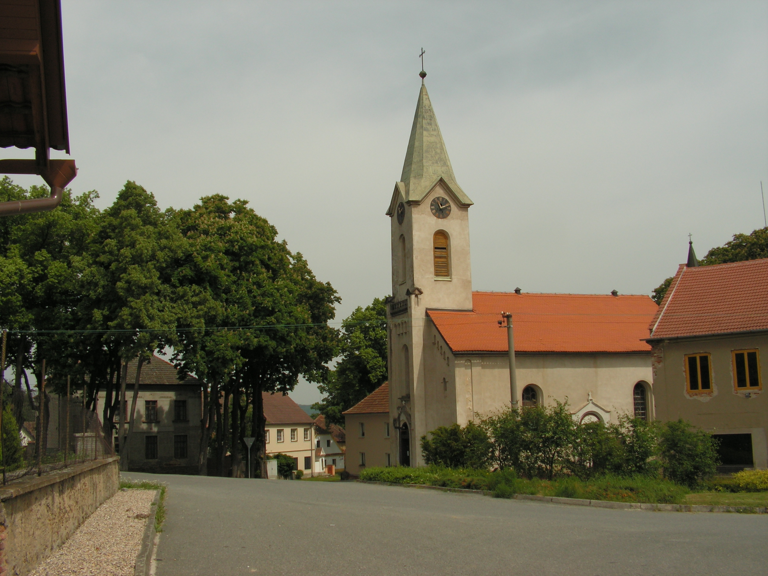 Původem románsko-gotický kostel sv. Jakuba Většího v Souticích.